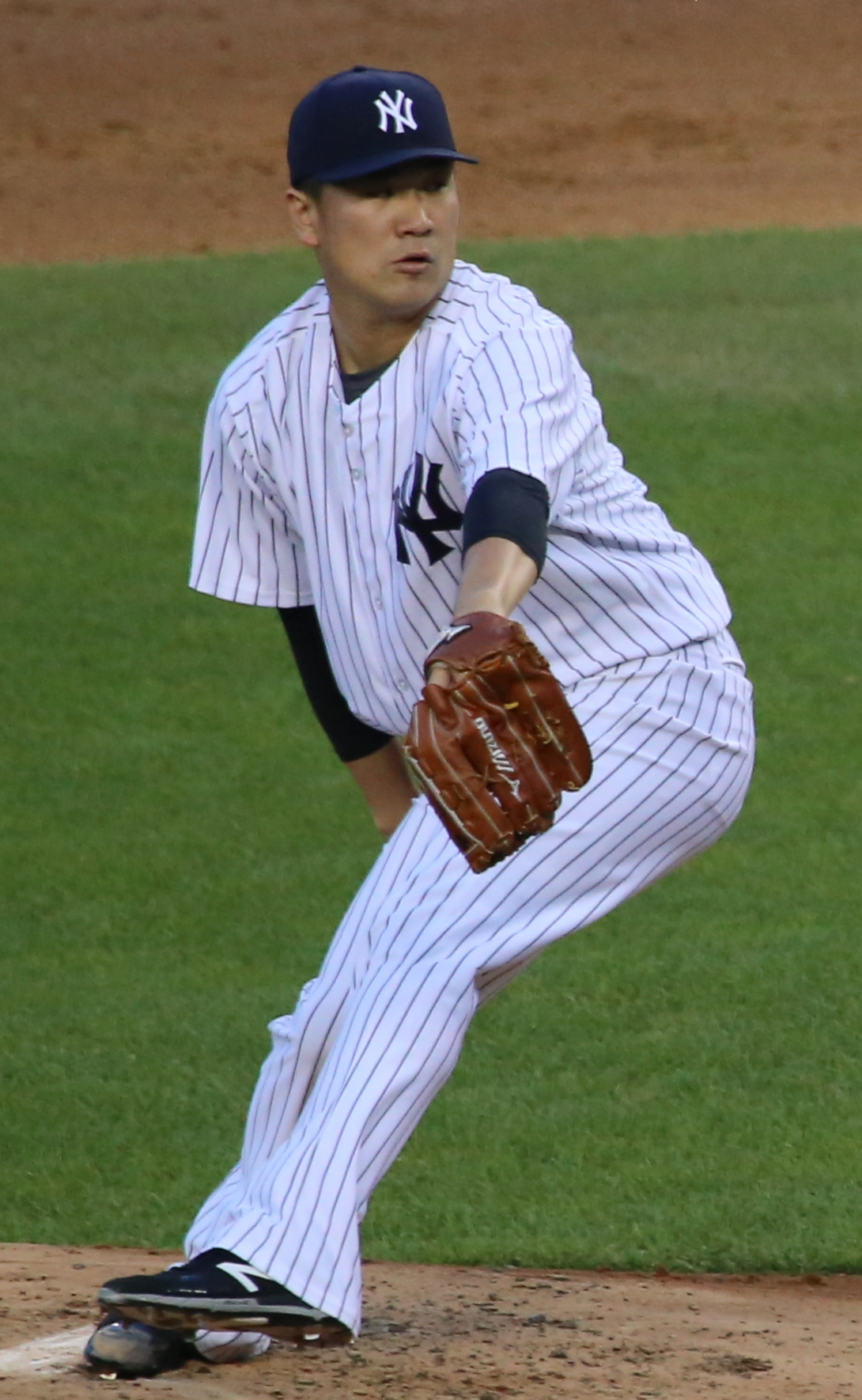 Masahiro Tanaka